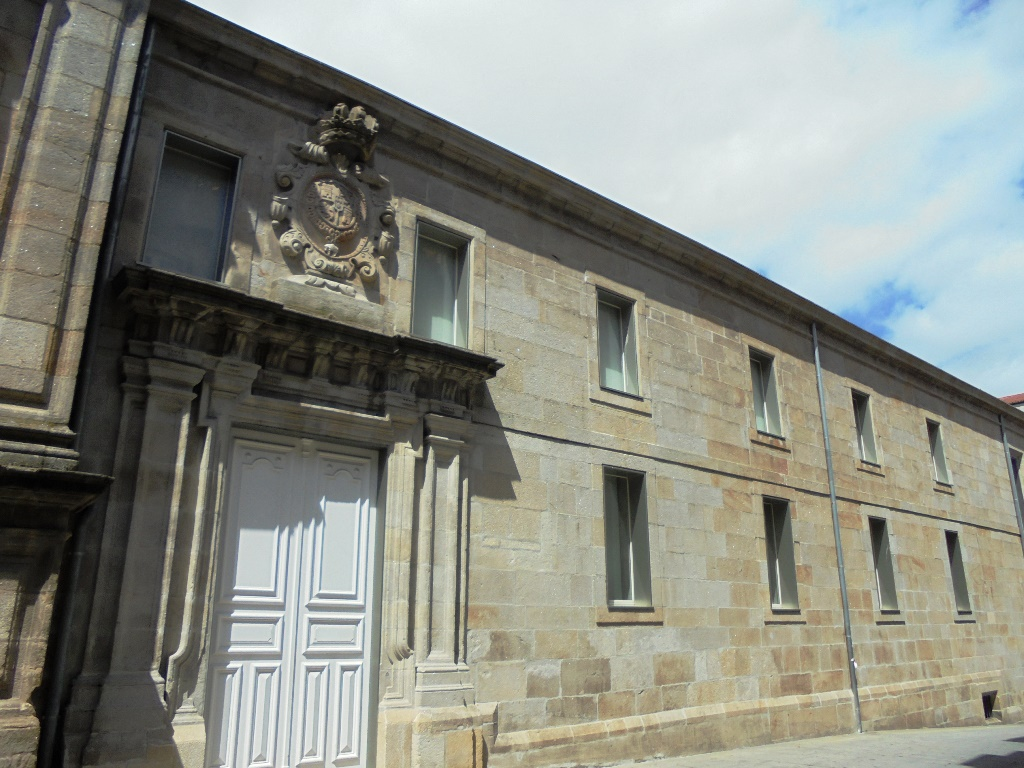 Portada de edificio Sarmiento